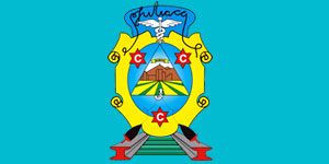 Bandera de Juliaca Puno